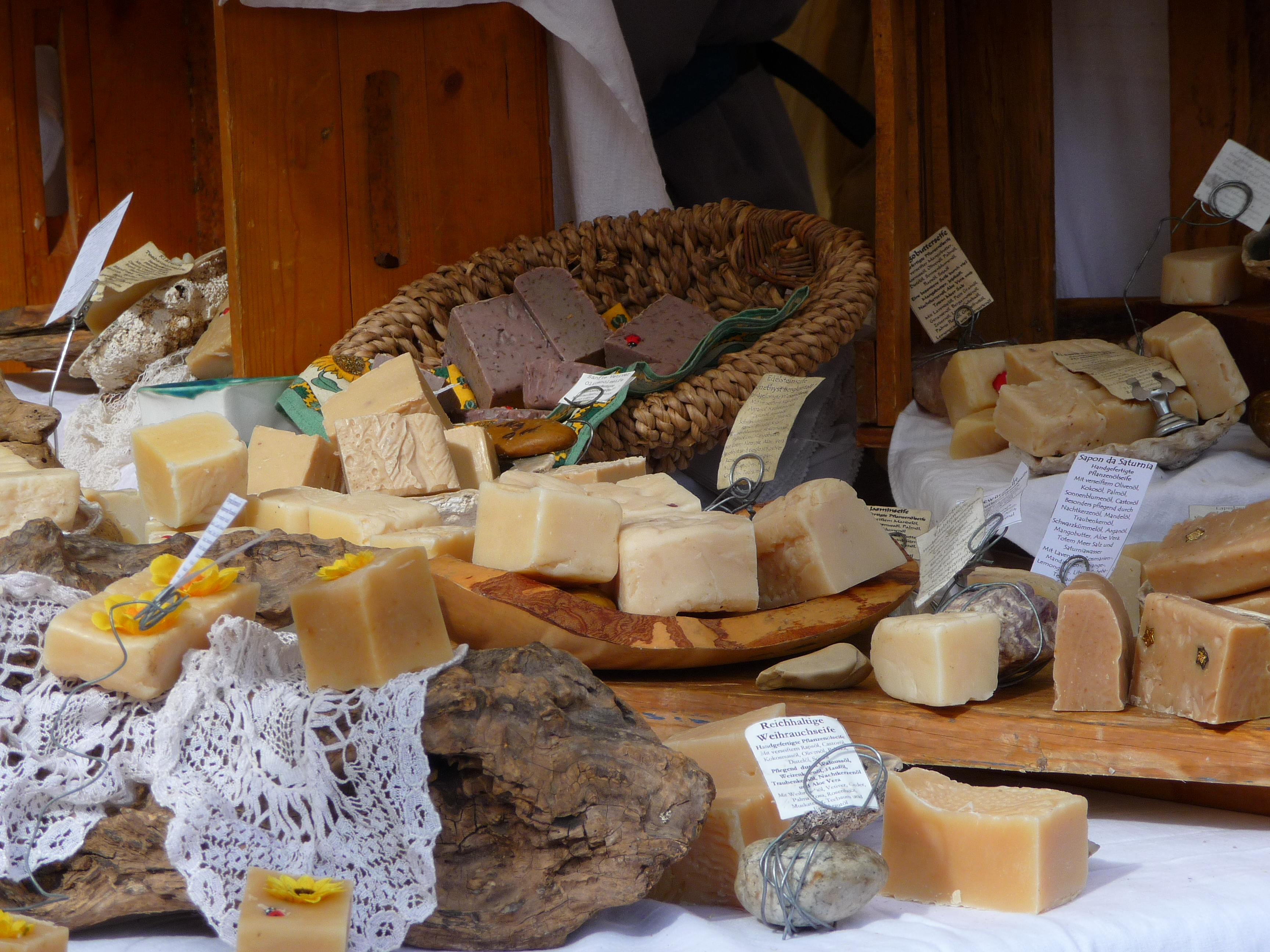 Stand mit Seifen aus eigener Herstellung auf dem Bauernmarkt in Speyer am 21.09.2008